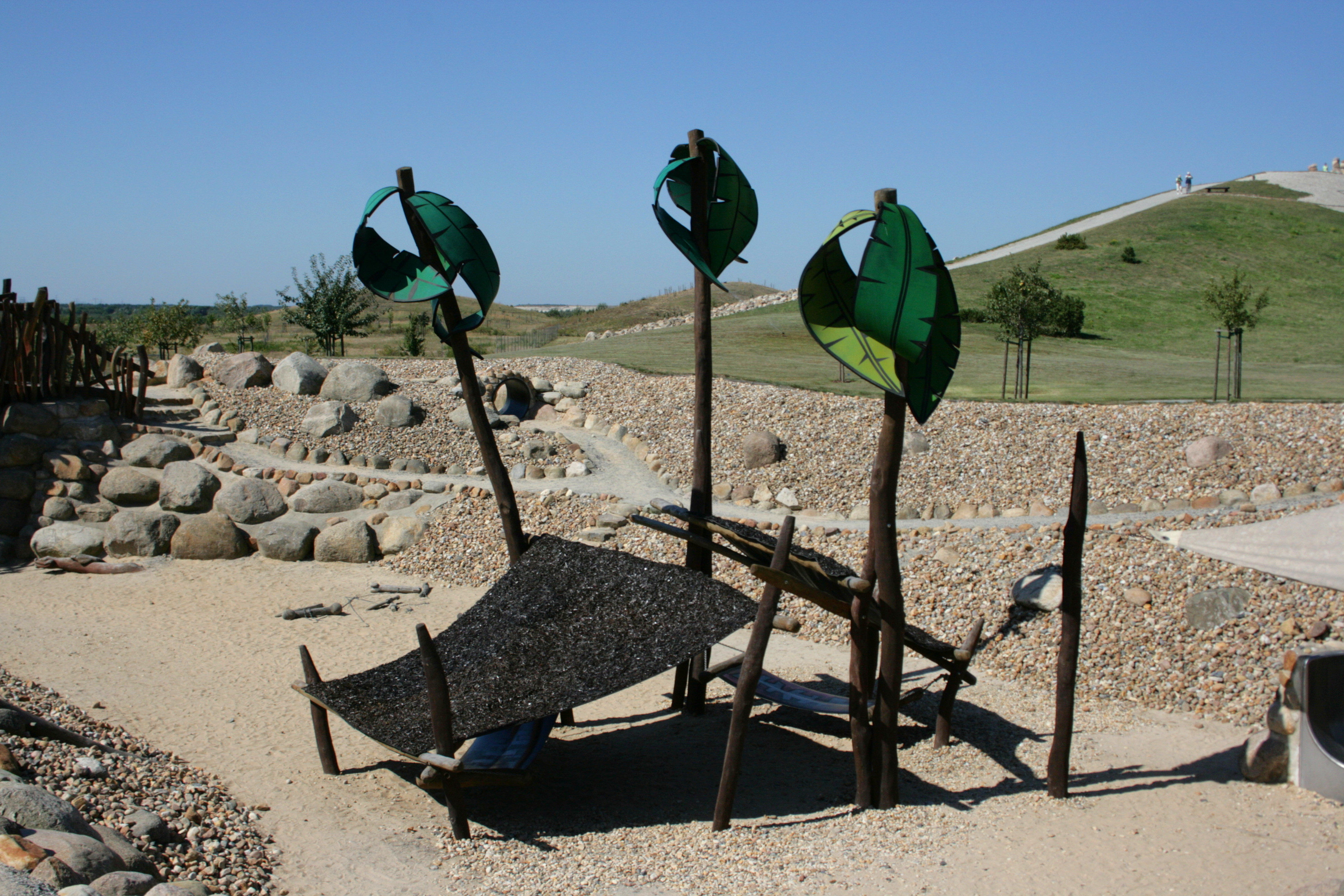 Findlingspark Nochten in Boxberg/O.L.-Nochten